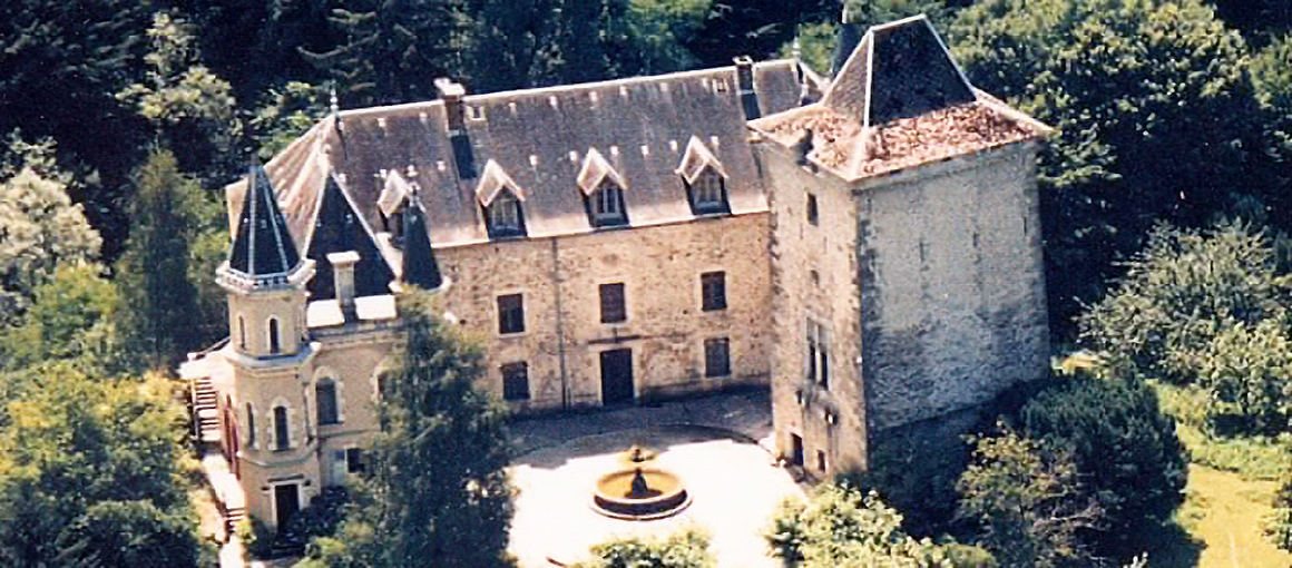 Château de Montfleury vue de haut